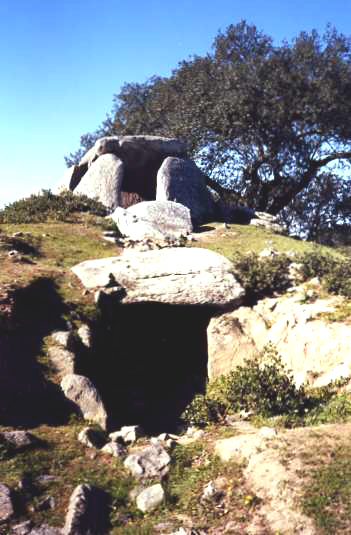 Anta